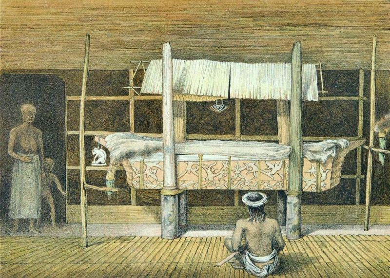 Litho. Carl Bock maakte in 1879 en 1880 een reis in Oost- en Zuid-Borneo, van Koetei naar Banjermasin. Over zijn ervaringen heeft hij een boek gemaakt.. Kleurenlitho getiteld "Katafalk van het hoofd van Longpoetih"